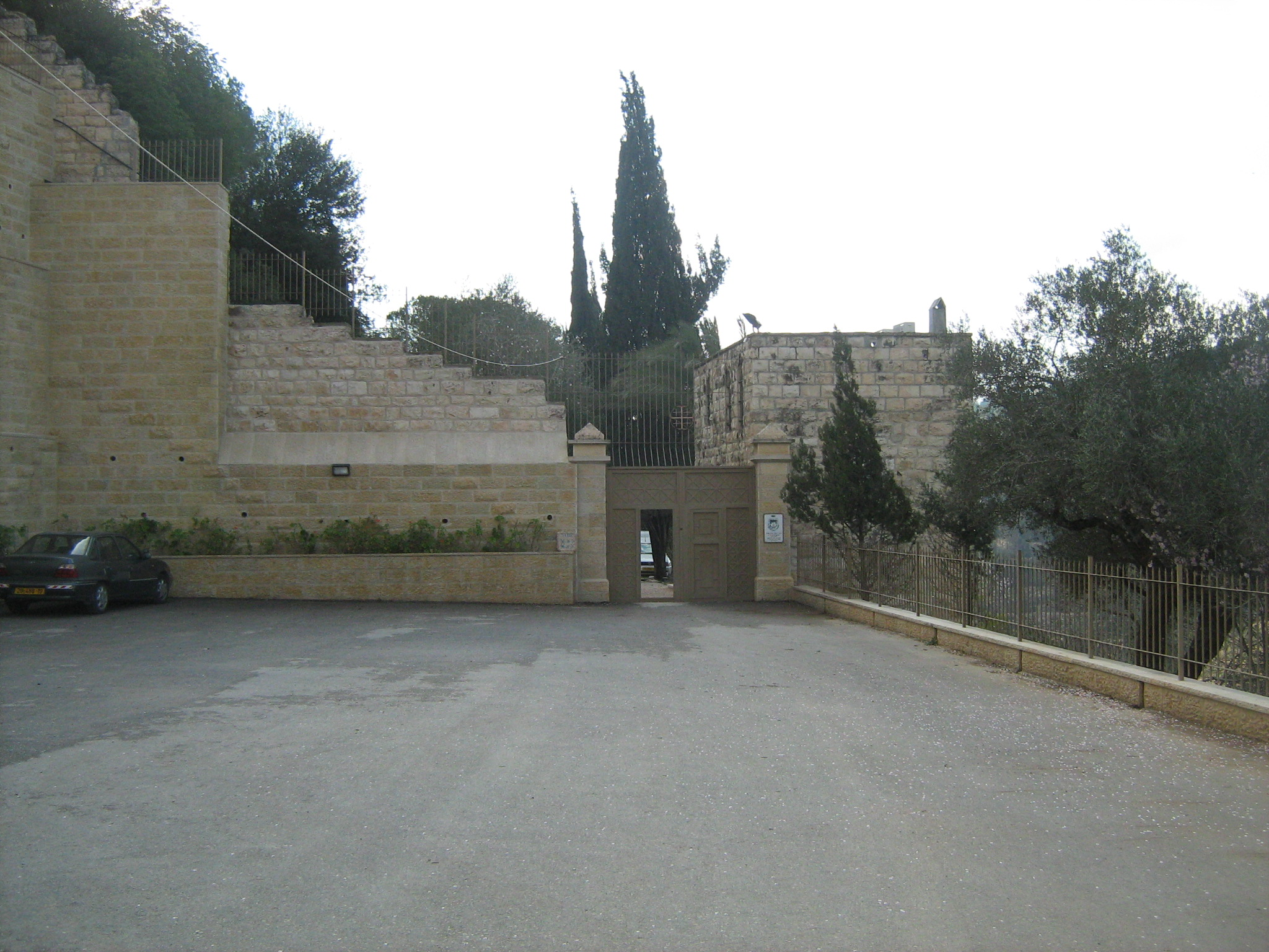 מנזר יוחנן במדבר